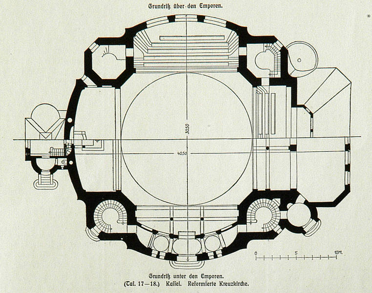 Grundriss der evangelisch-reformierten Kreuzkirche in Kassel, erbaut 1904-1906, 1943 zerstört